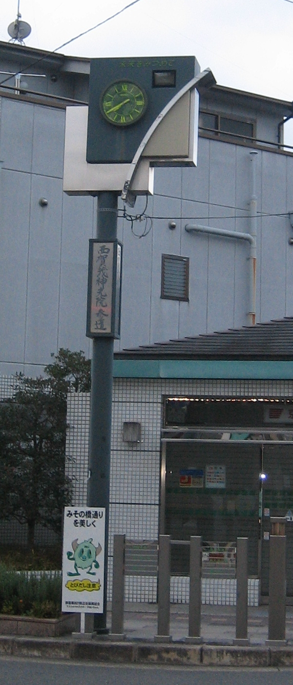 御薗橋通時計台を撮影